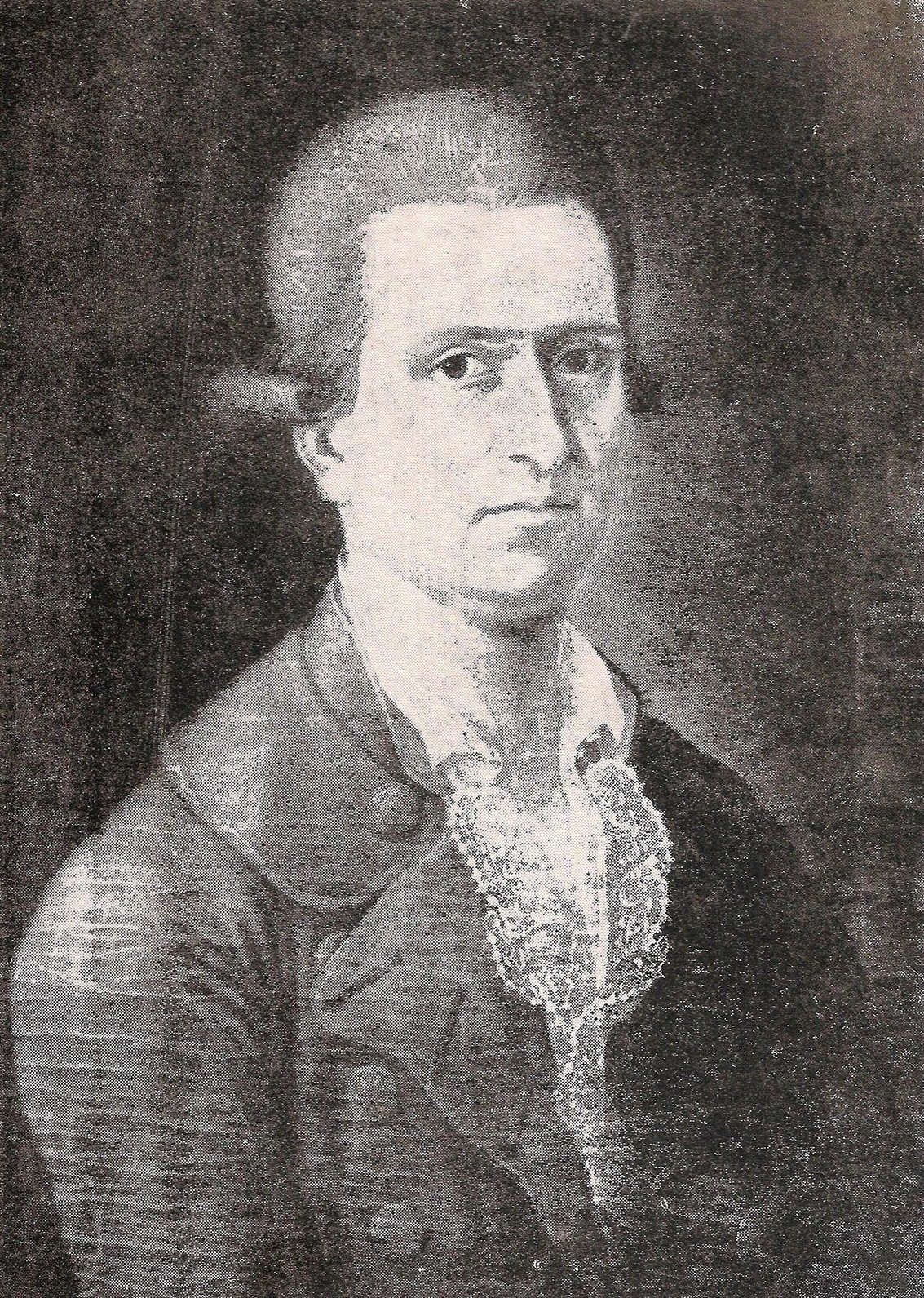 malíř Dominik Oesterreicher